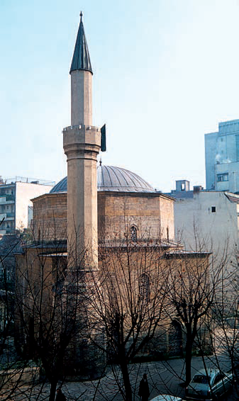 изгледи, џамија